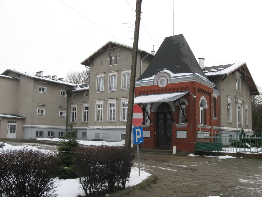 Stanisławie, dwór